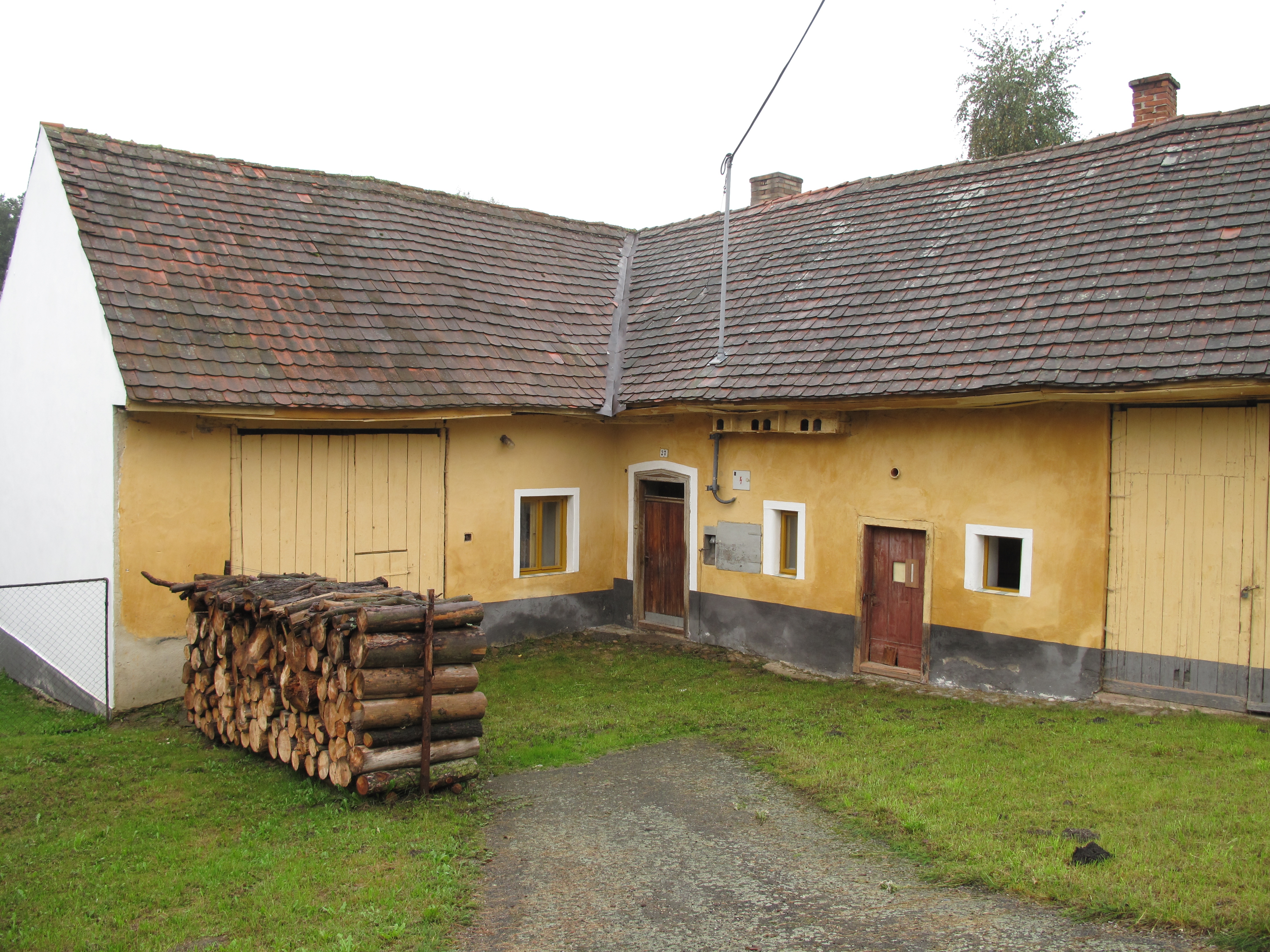 Dvorek žlutého domu ve Střídce. Okres Strakonice, Česká republika.